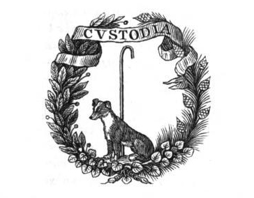 Custodian of Accademia dell' Arcadia (Roma) Seal